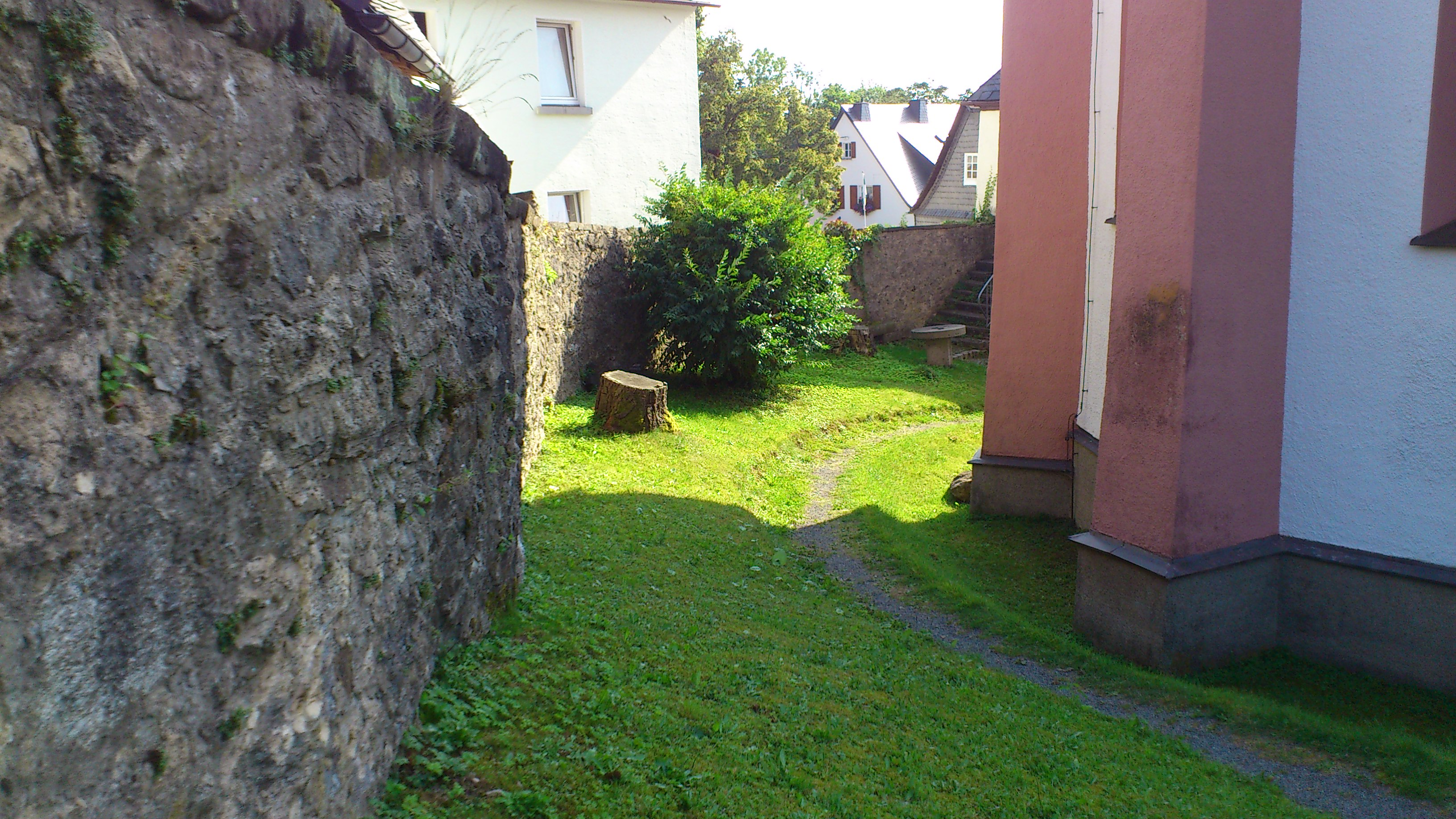 Wehranlage